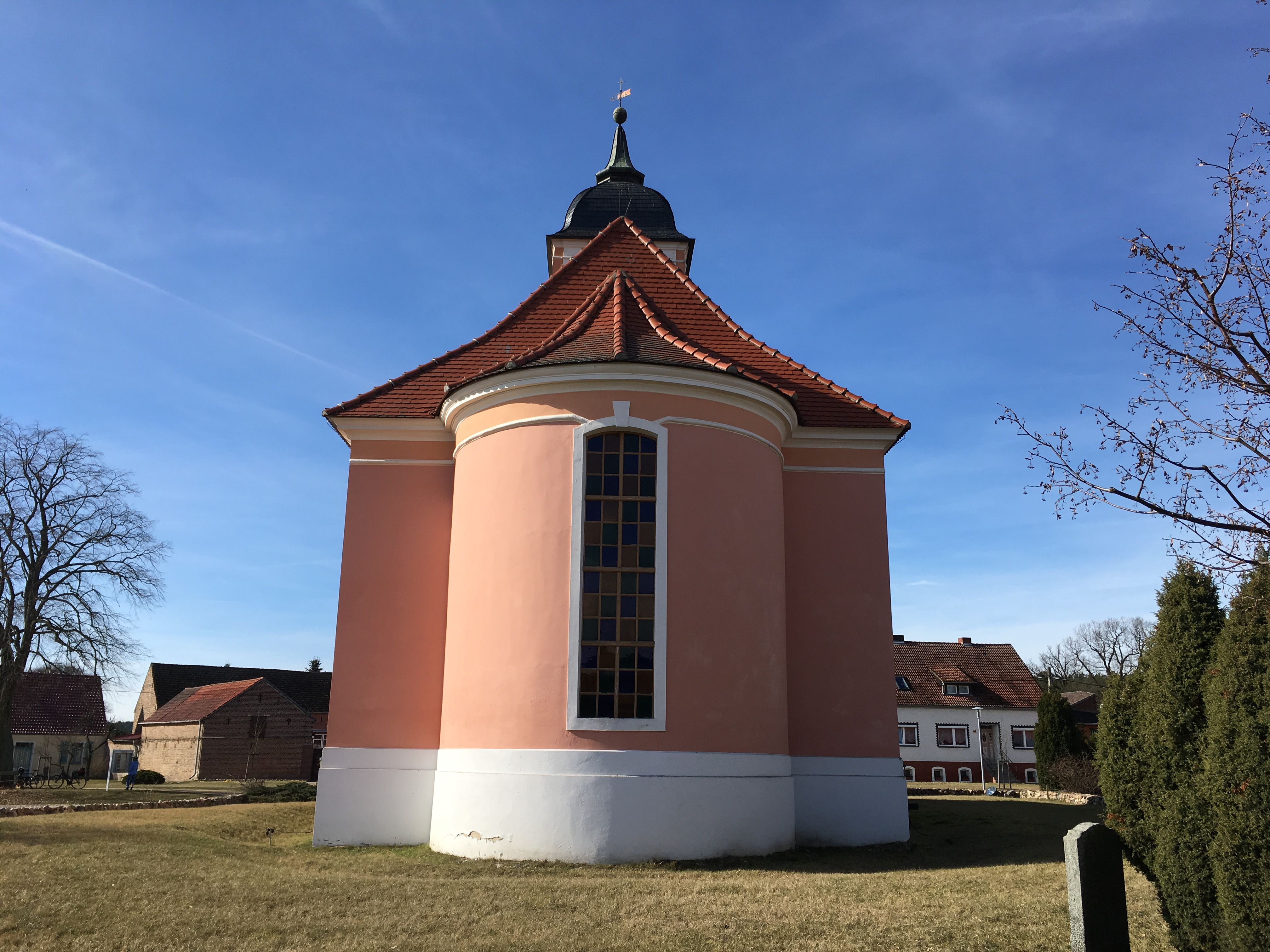 Die Dorfkirche Reesdorf entstand im Jahr 1775 vermutlich auf den Resten eines Vorgängerbaus aus dem 14. Jahrhundert. Die Kanzel und die Hufeisenempore stammen aus der Bauzeit; die Orgel aus der Mitte des 19. Jahrhunderts.